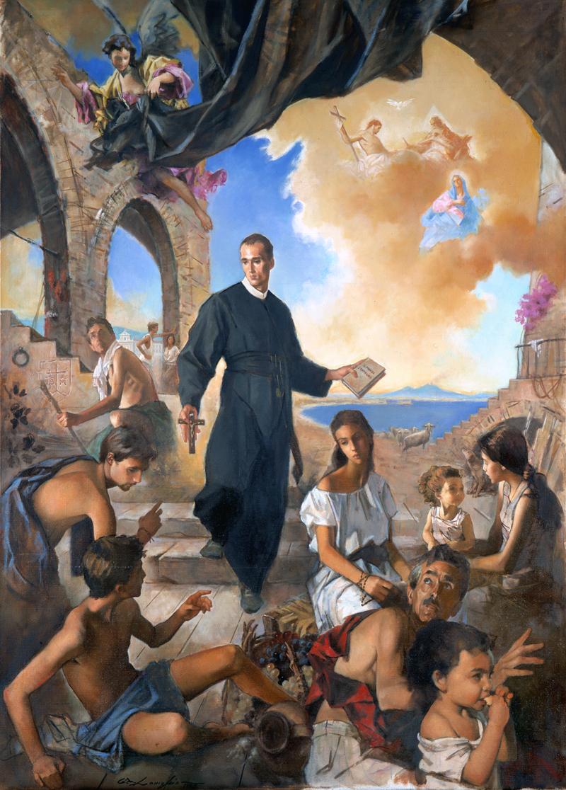 Beato Gennaro Maria Sarnelli - dipinto realizzato dall'artista Giuseppe Antonio Lomuscio